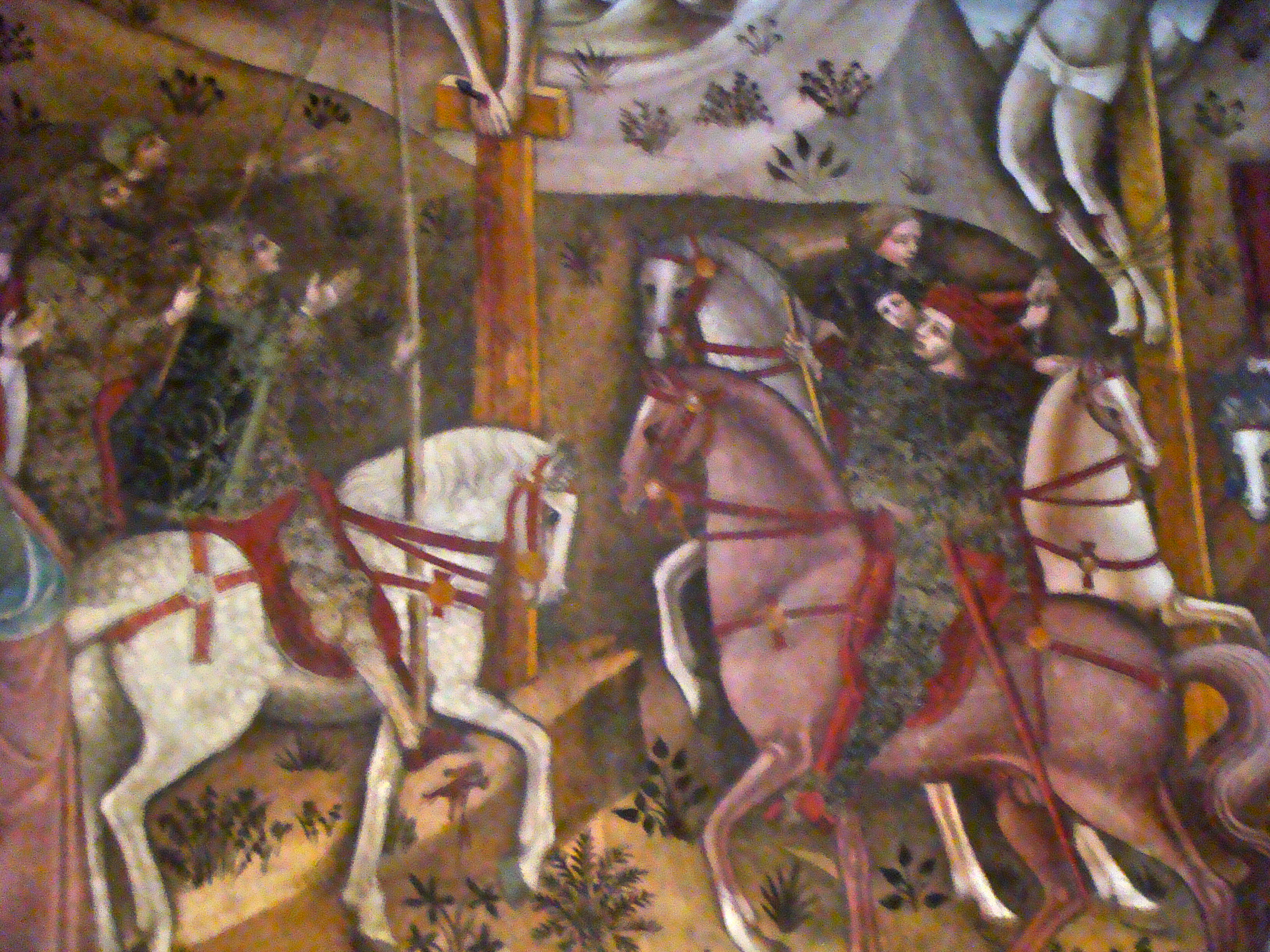 detail